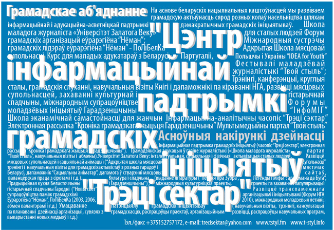 Беларуская (тарашкевіца): ГА "Цэнтр "Трэці сектар"